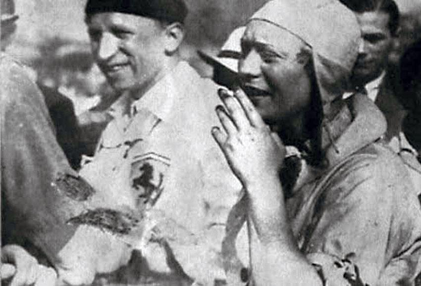 A corredora Hellé Nice, fuma antes de participar do circuito da Gávea do Grande Prêmio Cidade do Rio de Janeiro, junho 1936